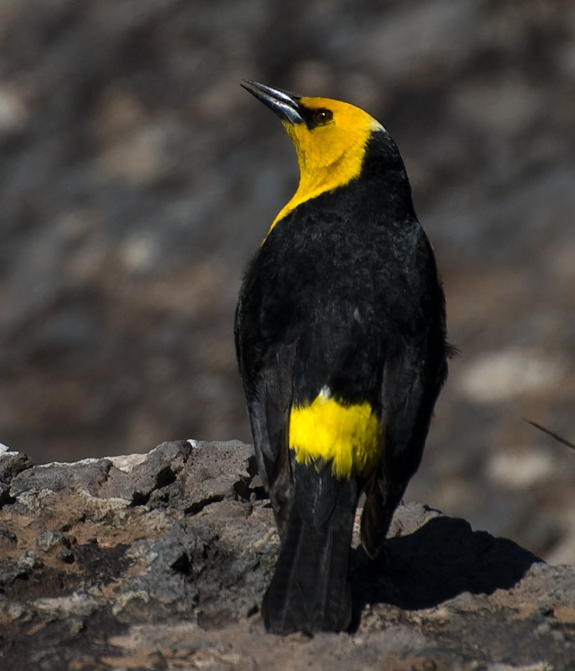 DRAGON_Xanthopsar_flavus